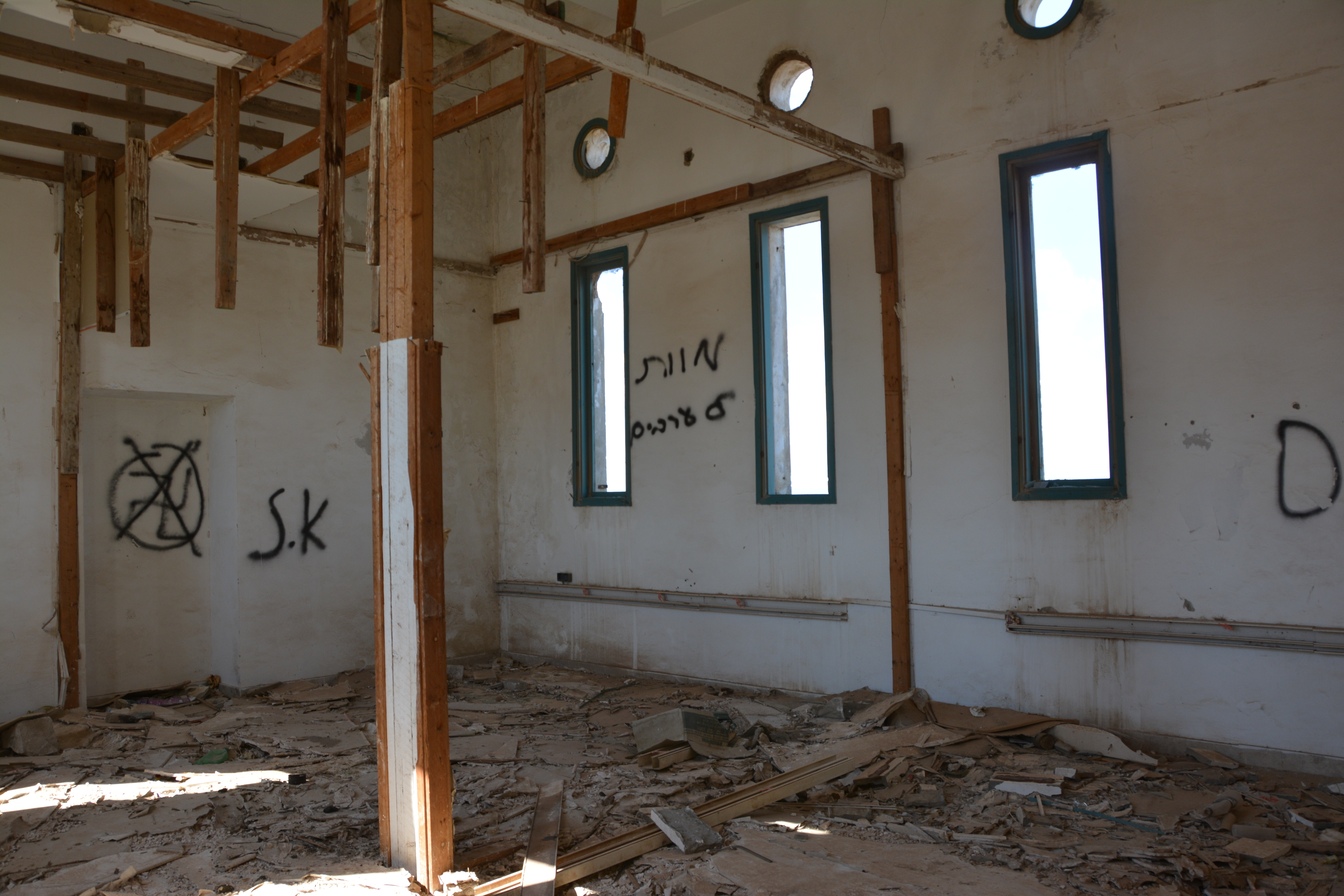 מחנה ישראל (דברת) היה קומונה של פועלי אגודת ישראל שהתארגנה לקראת חיי קיבוץ. אנשי הקבוצה התיישבו על אדמה שנרכשה בשנת 1925 בעמק יזרעאל, ליד קיבוץ דברת של היום.